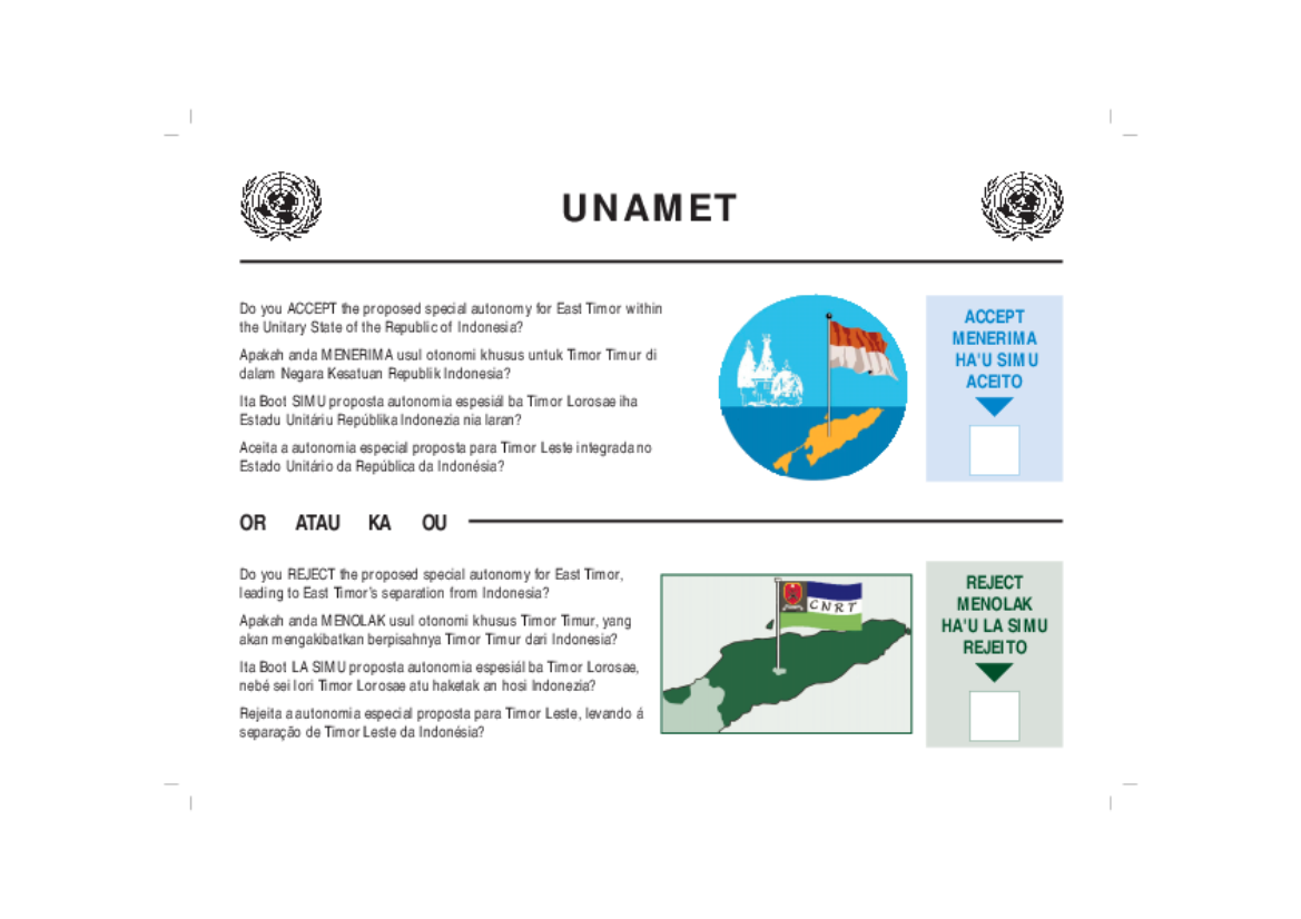 Bulletin de vote utilisé lors du référendum sur l'indépendance du Timor Oriental en 1999